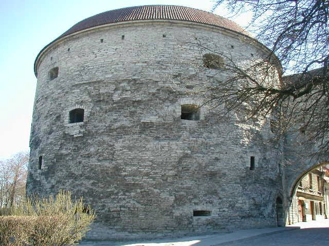 Paks Margareeta